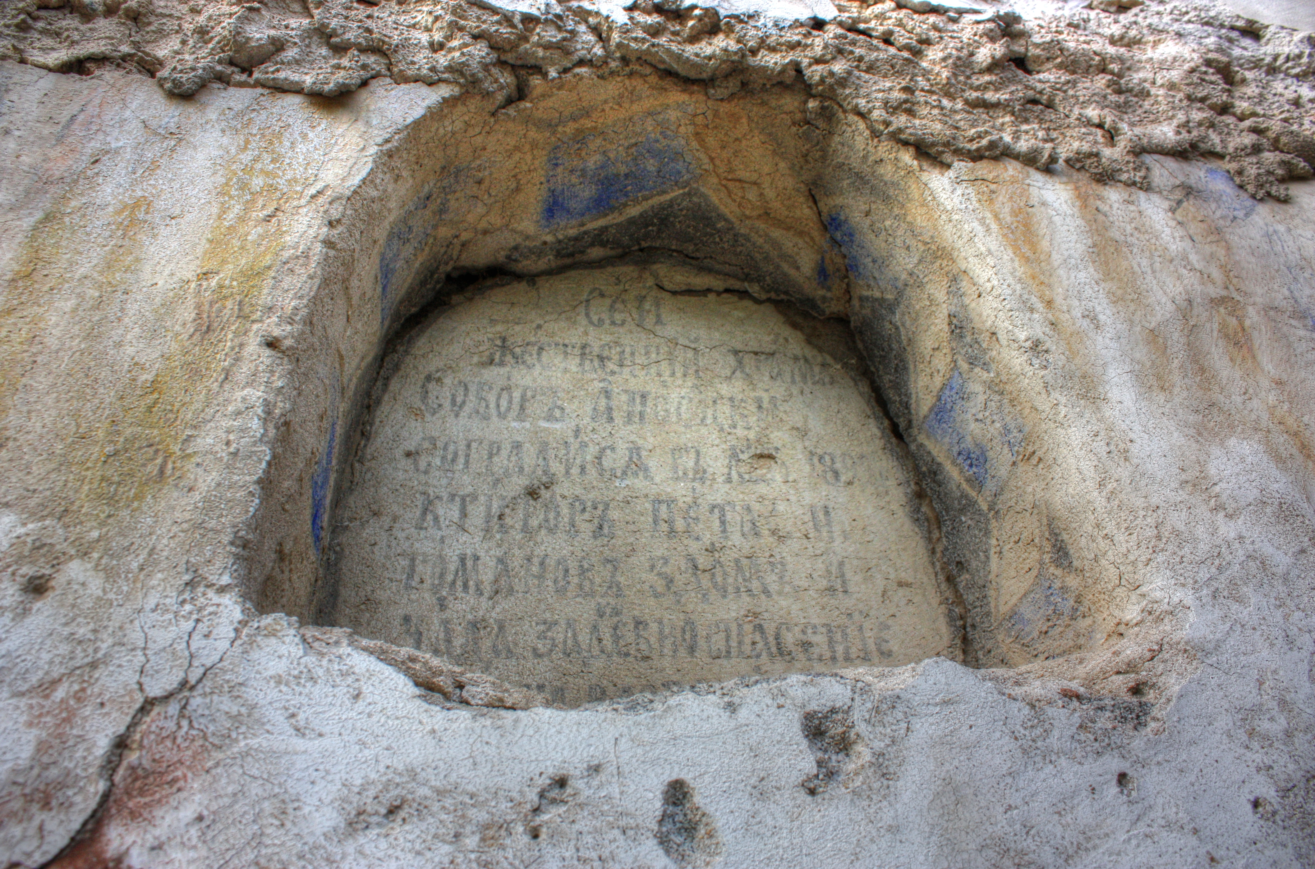 Църквата "Св. Св. Петър и Павел в село Мечкул.